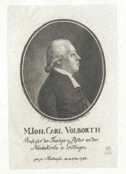 Porträt des Göttinger Theologen Johann Carl Volborth (1791, gestochen von Heinrich Schwenterley